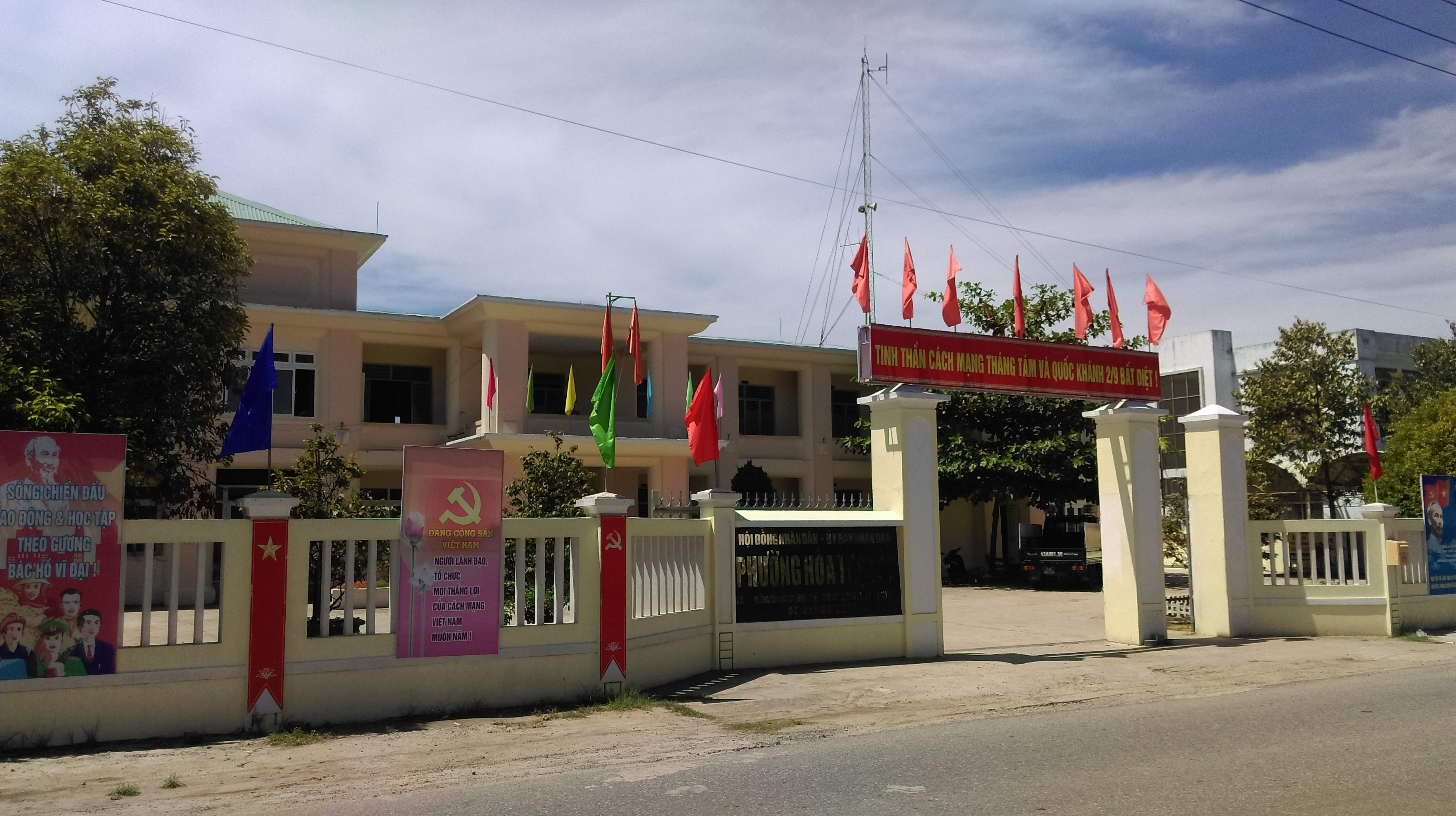 UBND phường Hòa Thọ Tây, Cẩm Lệ, Đà Nẵng